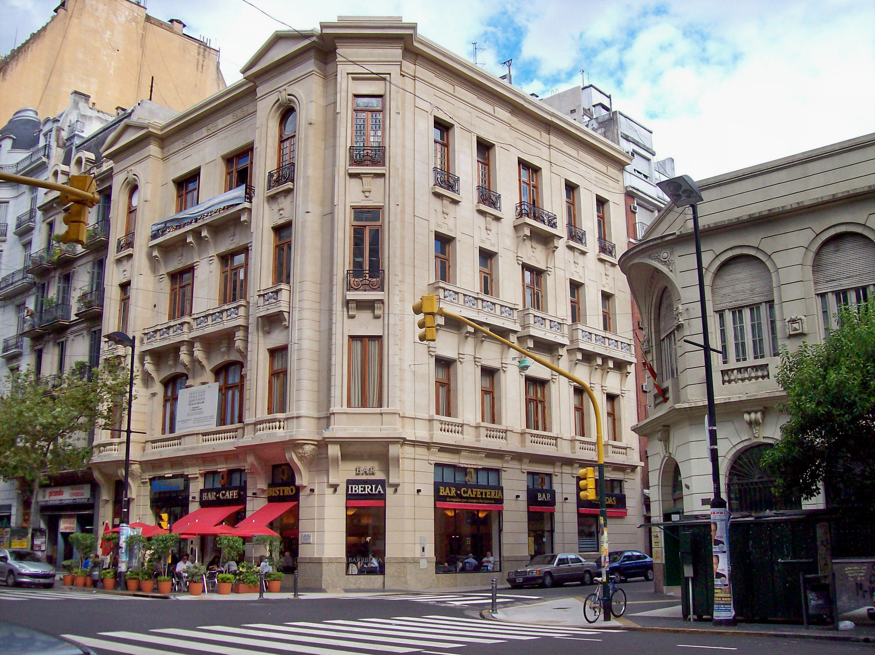 Avenida de Mayo, Buenos Aires: Café Iberia: Esquina de la hispanidad. Actual Edificio Cassará, restaurado en 2006.